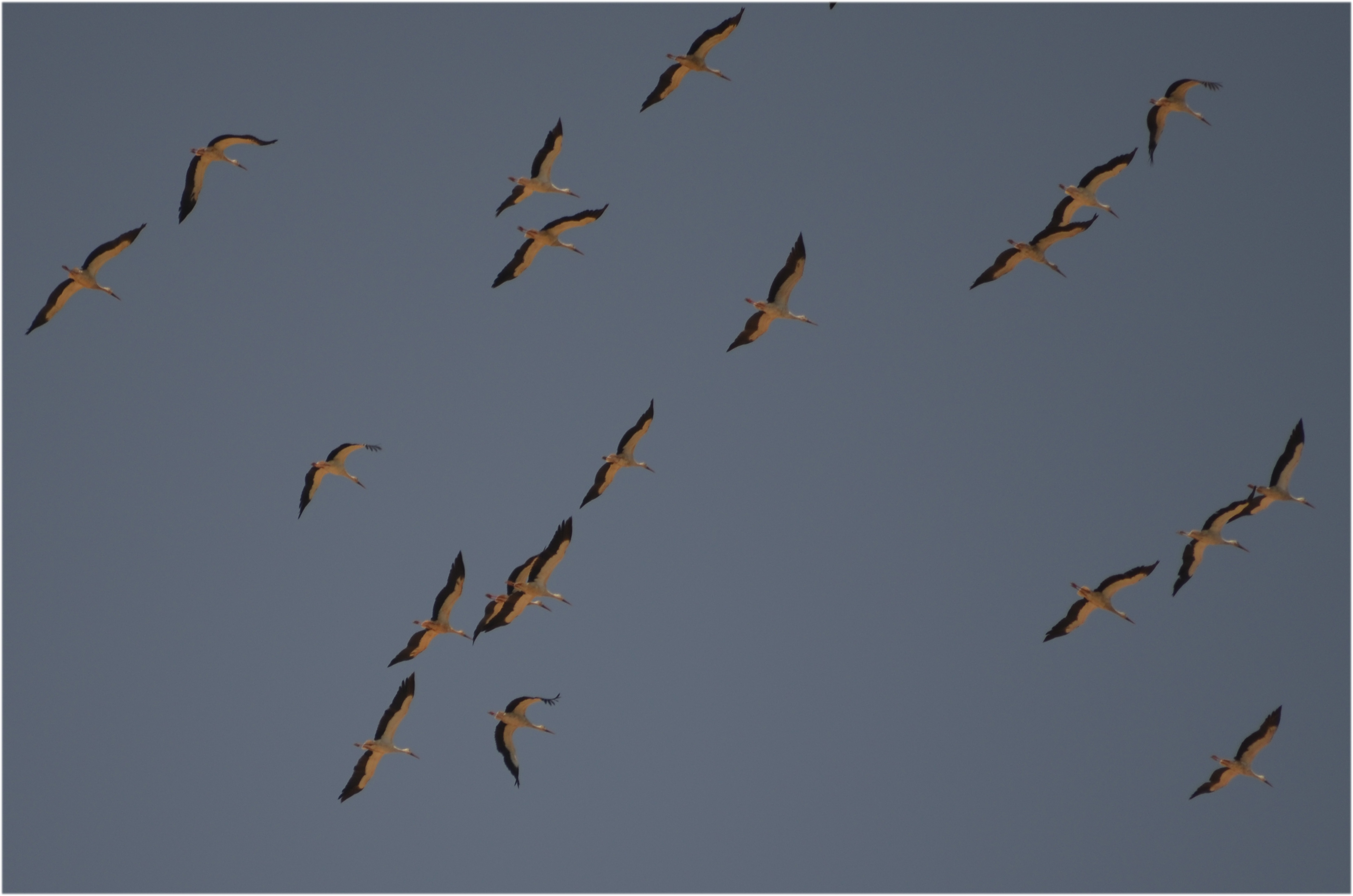 طيور اللقلق المهاجرة اثناء تحليقها فوق العين السخنة